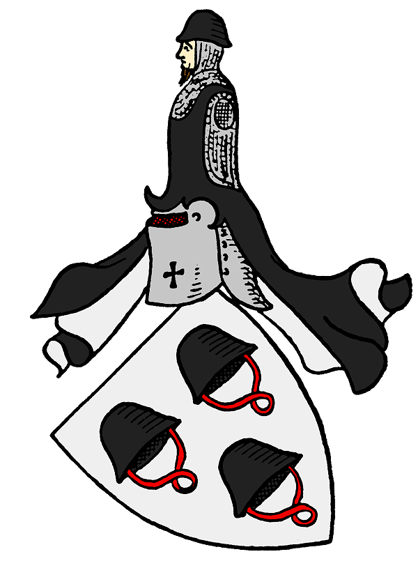 Wappen derer von Ketelhodt